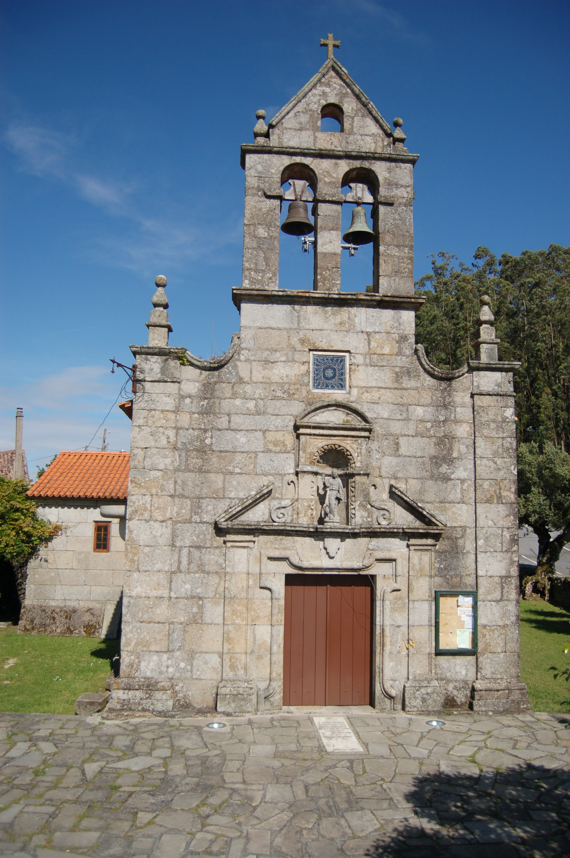 Igrexa parroquial de San Xoán de Leiro (Ribadumia)